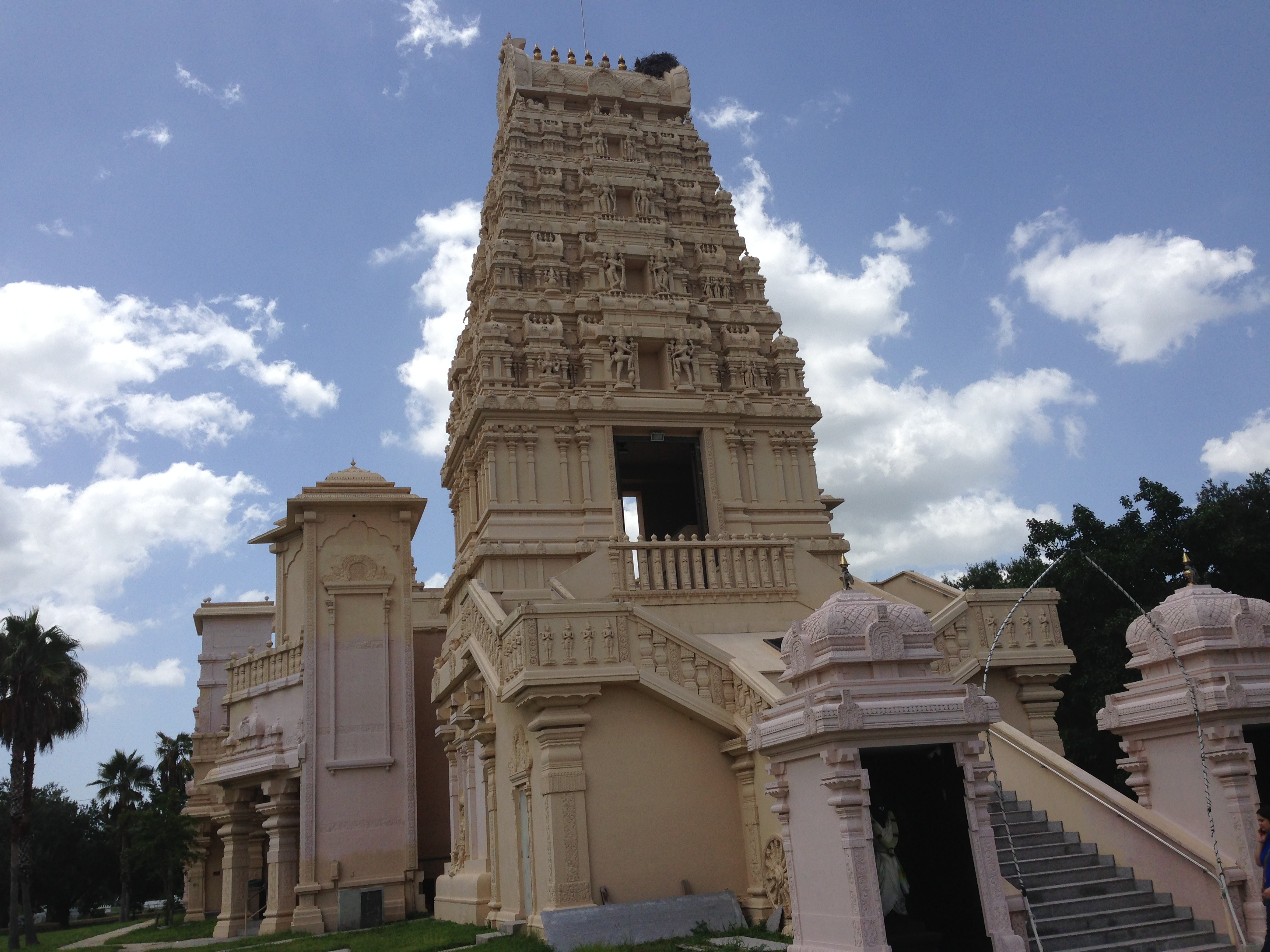 Sri Sathya Narayana Temple